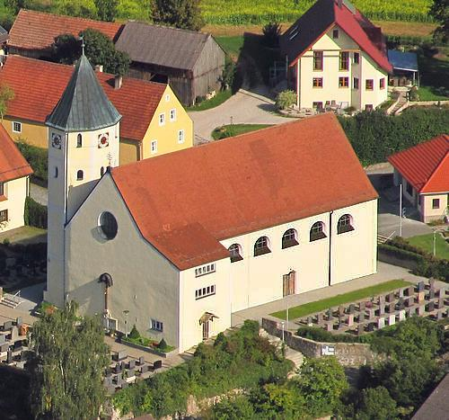 Pfarrkirche Schmidgaden, 92546 Schmidgaden. Der ursprüngliche Bau stammte aus dem 14. Jahrhundert.